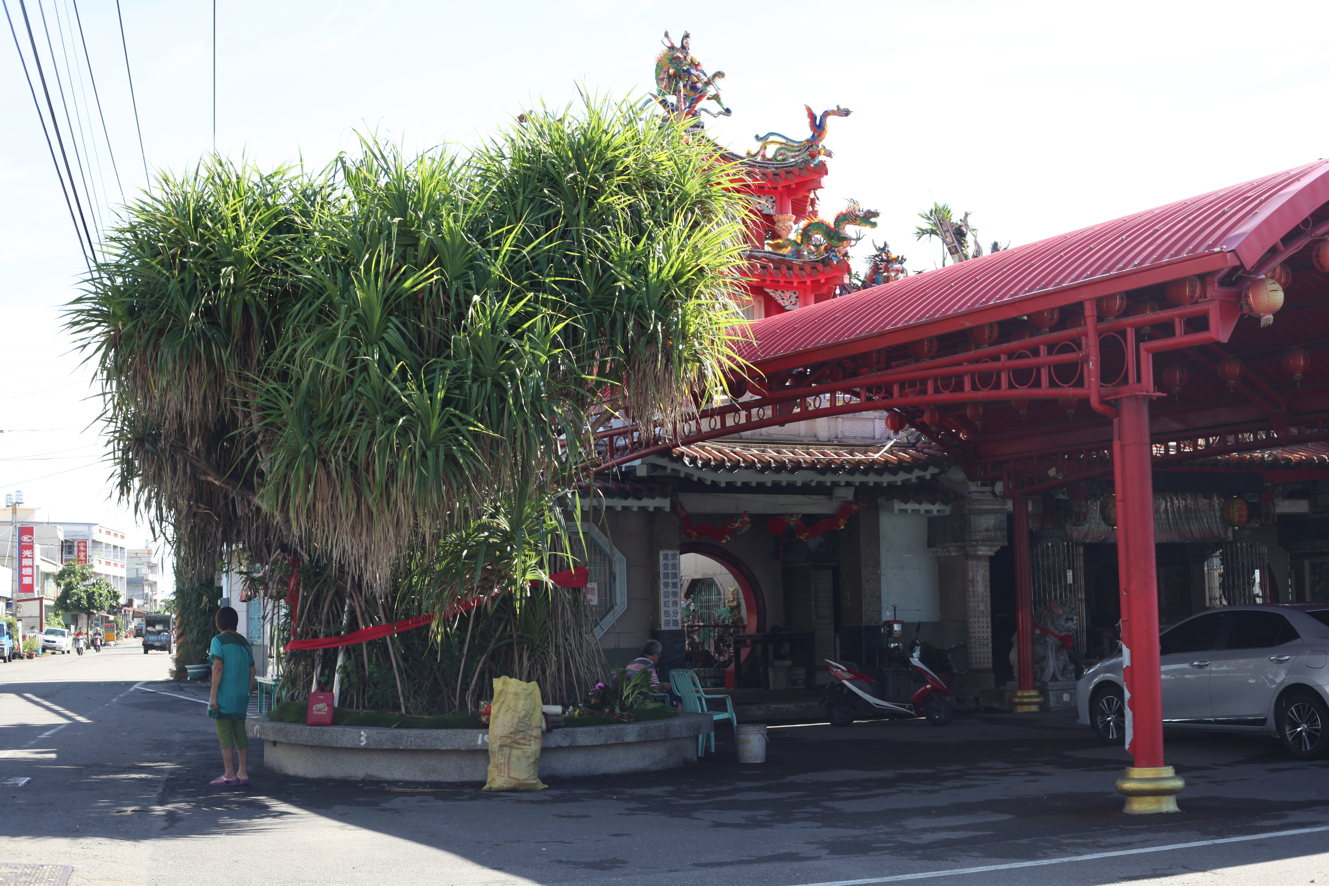 中文（台灣）: 娘媽廟，位於台灣嘉義縣六腳鄉灣南村